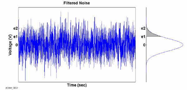 Gaussian Noise Time domain distribution